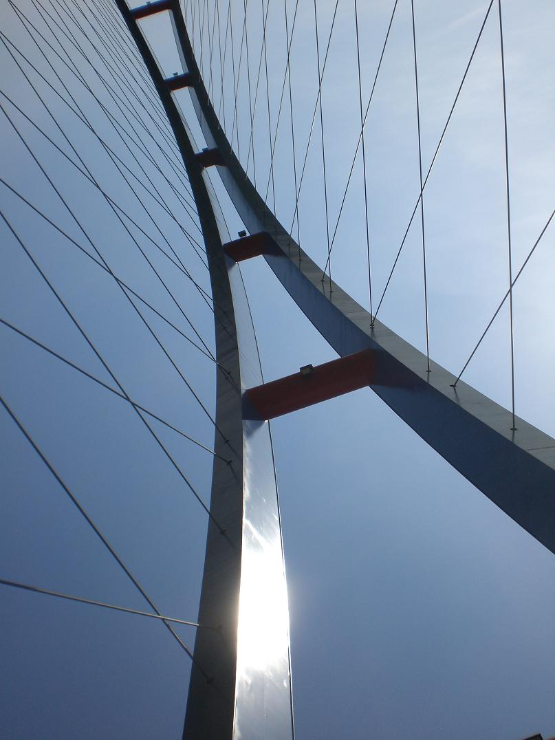 Pylon mostu w Wolinie